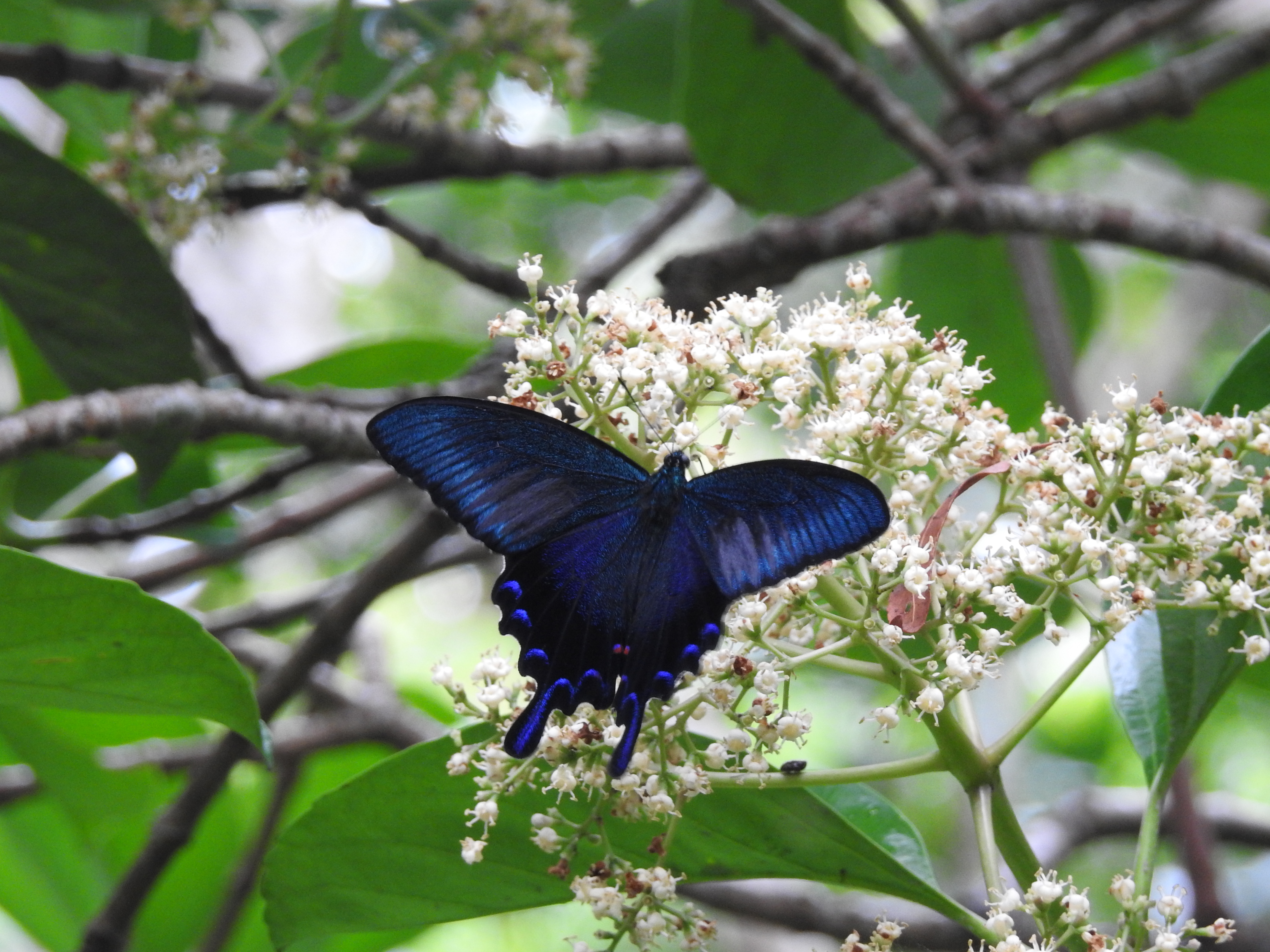 沖縄県大宜味村イギミハキンゾー展望台付近で撮影したオキナワカラスアゲハです。